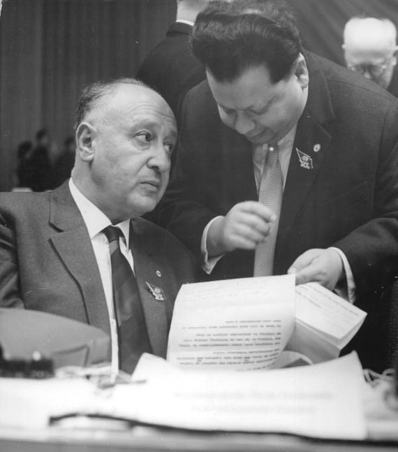 Zentralbild Kollektiv Me-At 15.1.1963 VI. Parteitag der SED vom 15.-21.1.1963 in der Werner-Seelenbinder-Halle in Berlin (1.Tag) UBz: Während einer Tagungspause im Gespräch (links) das Mitglied des Politbüros des ZK der SED Albert Norden und das Mitglied des Zentralkomitees der SED und Chefredakteur des "Neuen Deutschland" Herrmann Axen. (Sturm)"